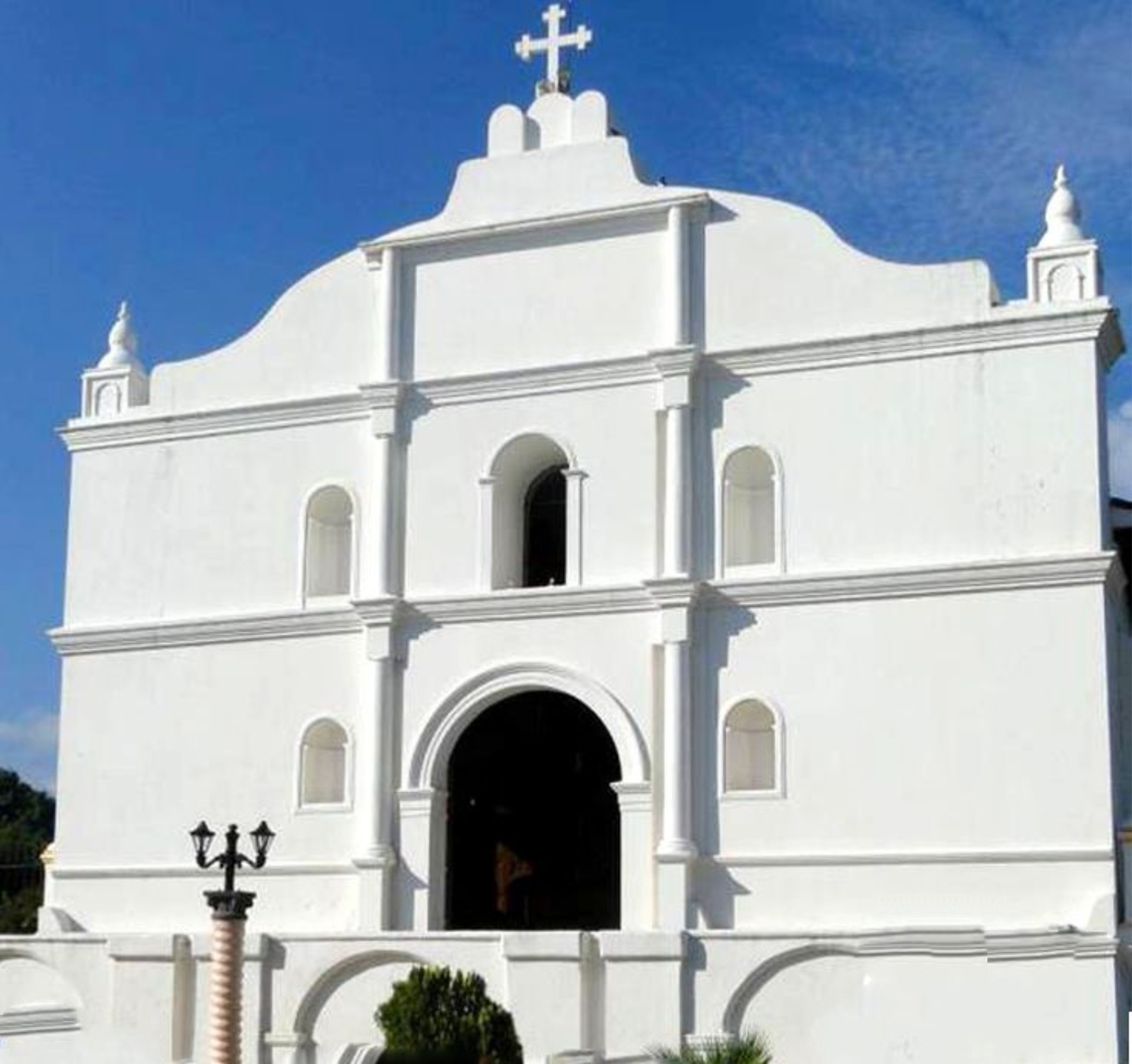 Iglesia San Sebastián Analco, Zacatecoluca